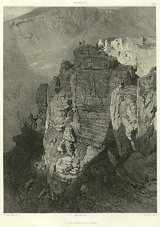 Daghestan. Rocher a Khounzak en Avarie.